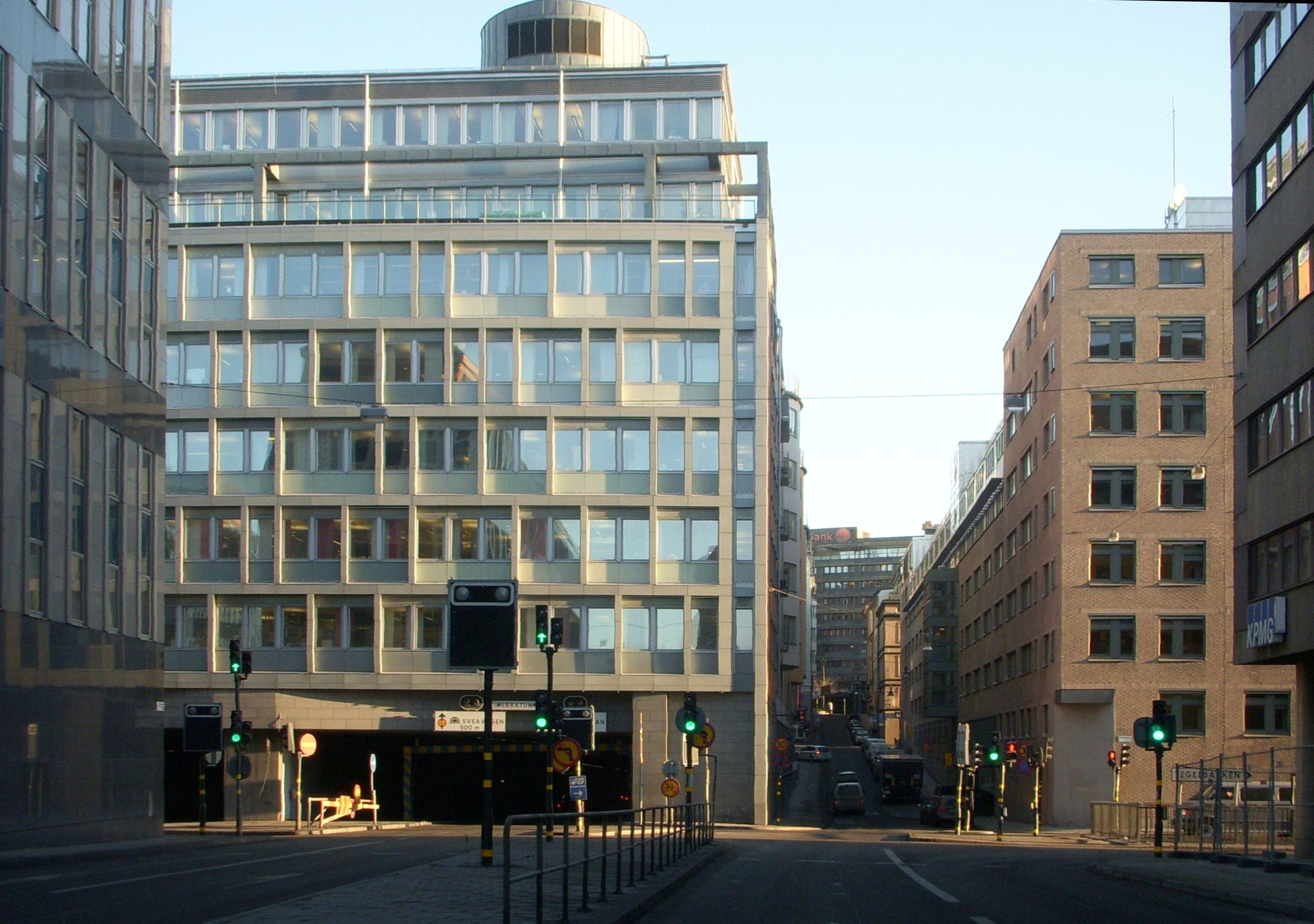 Kvarteret Elefanten i Stockholm, vy mot öst